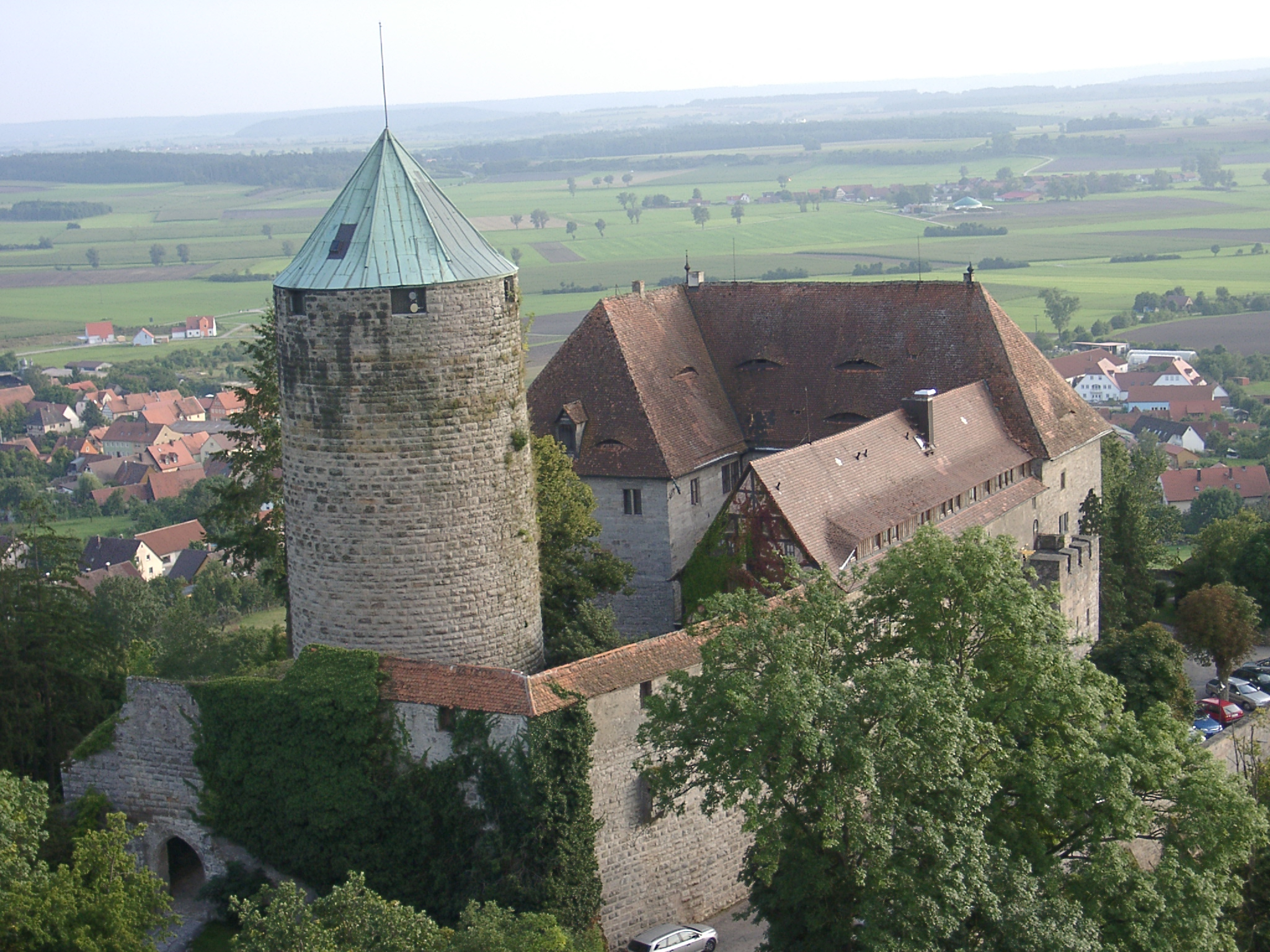 Burg Colmberg von der Rückseite.